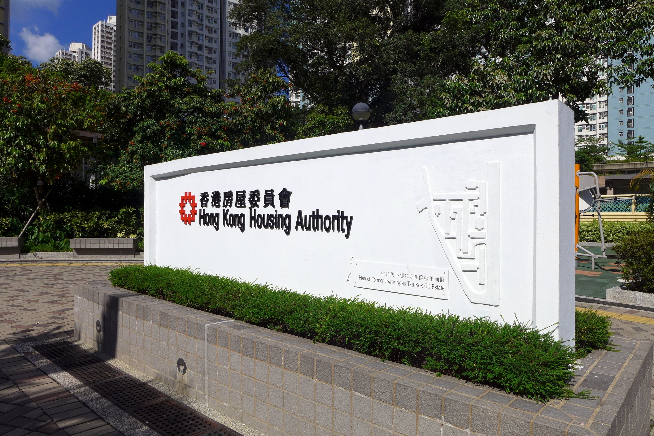 Lower Ngau Tau Kok Estate Old signboard